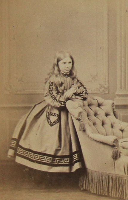 Елена Александровна Строганова (1855—15.10.1876), фрейлина двора, умерла от воспаление легких в Ницце.